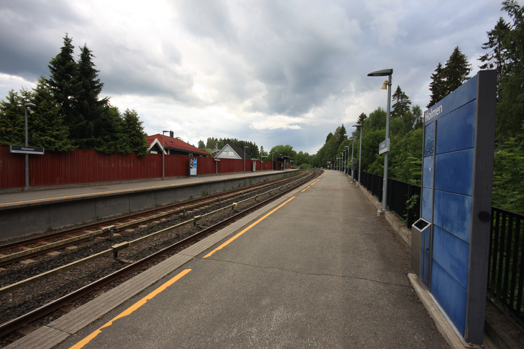 Holmen T-banestasjon. Sett fra Spor 2 mot Hovseter.